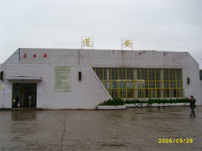 蓬安县火车站